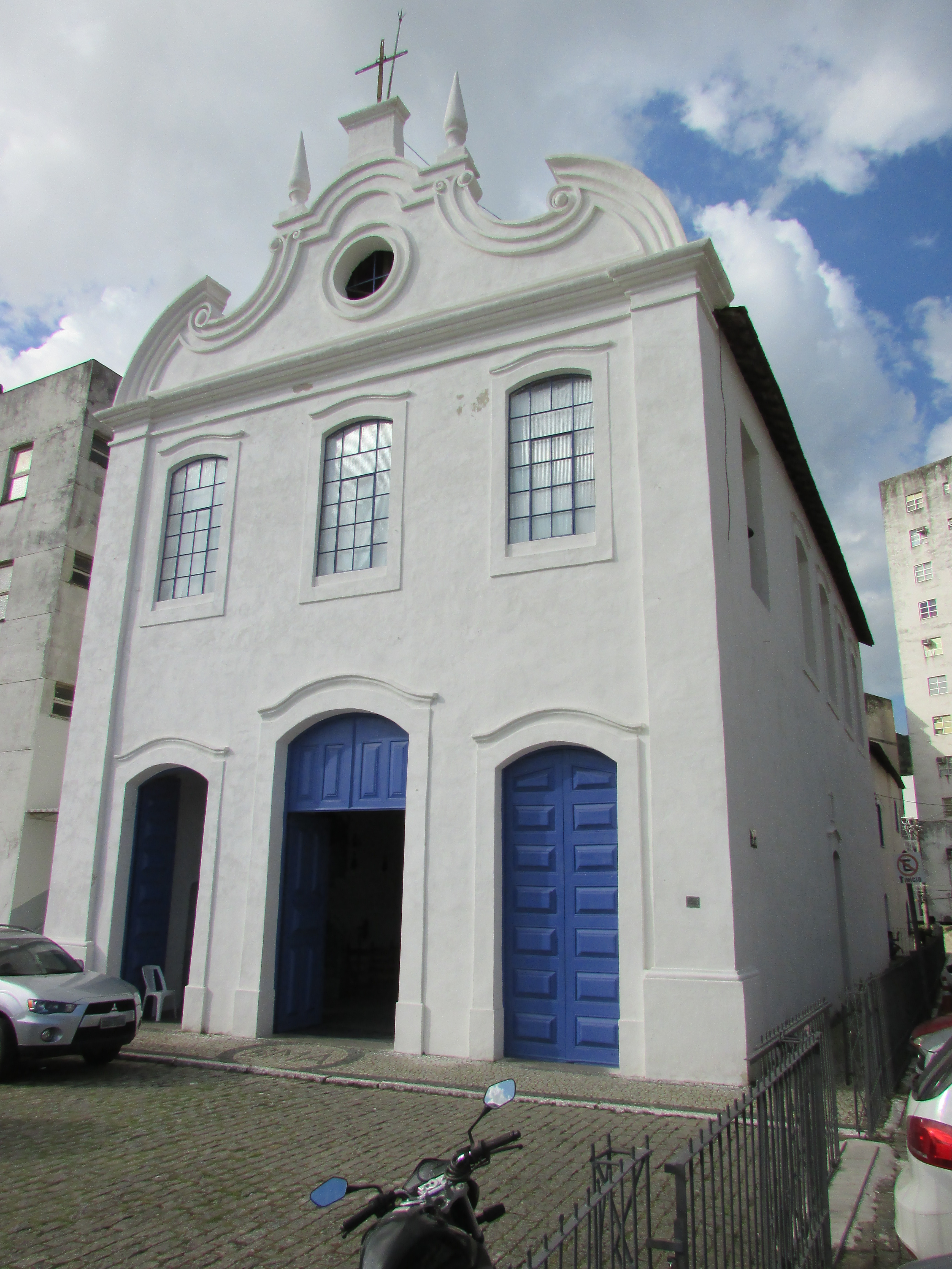 Igreja de Santa Luzia